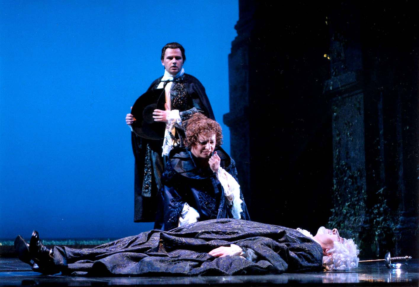 Blagoj Nacoski